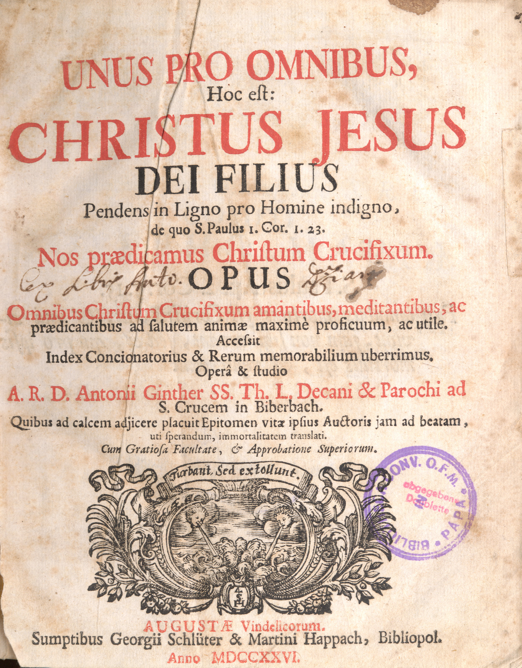 Titelblatt aus u.g. Werk.